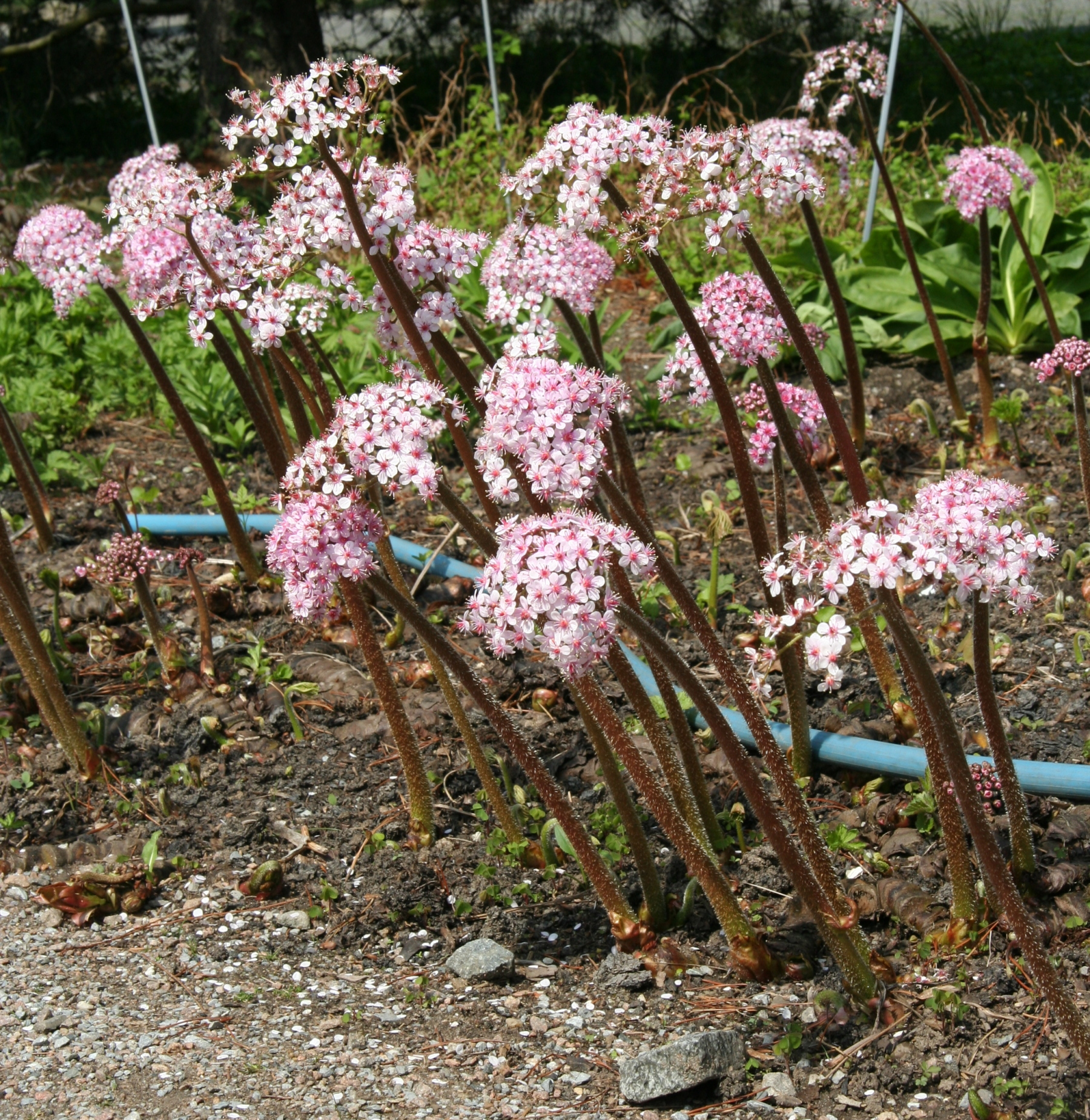 Darmera peltata im Botanischen Garten Dresden